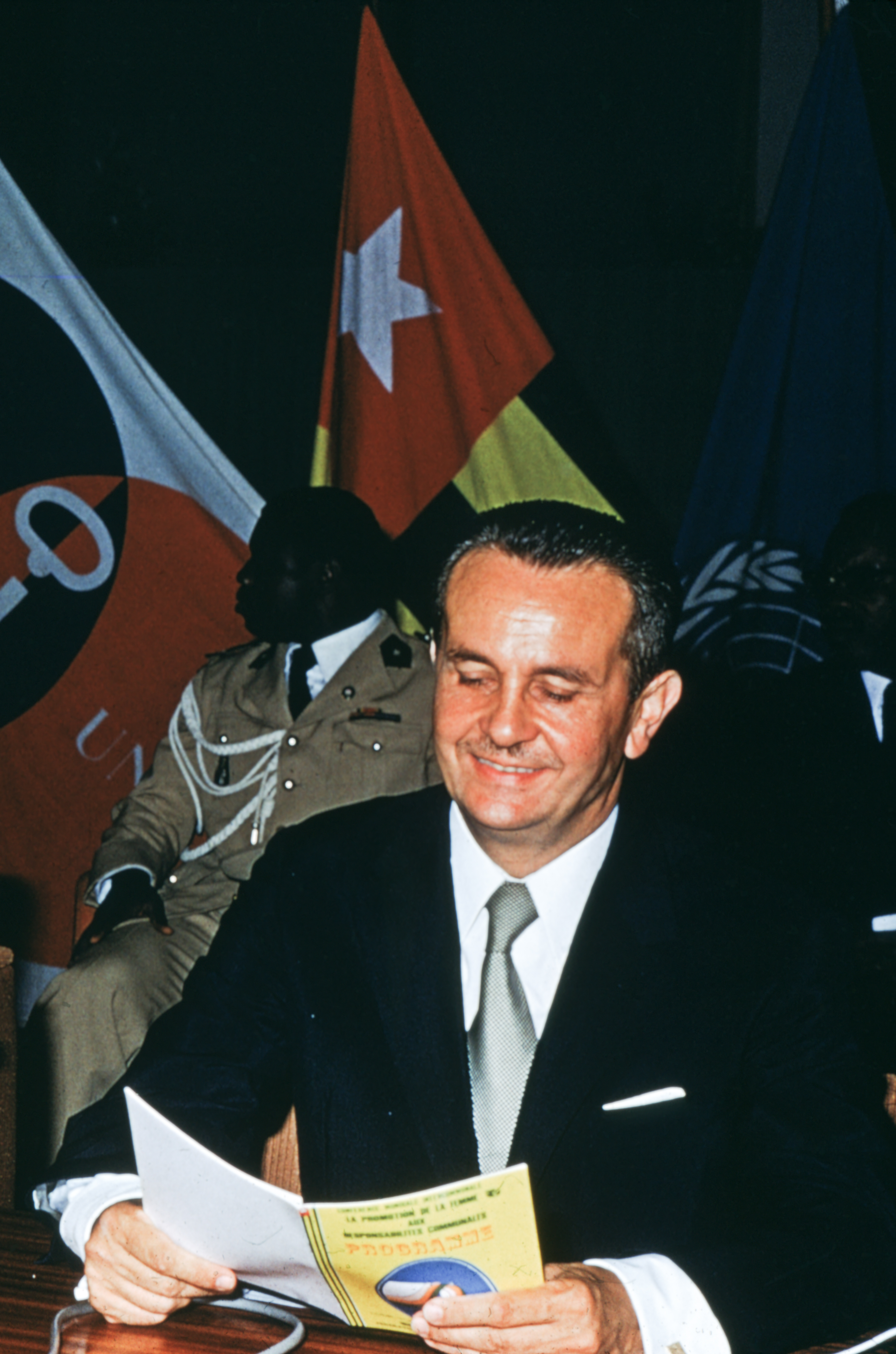 Colloque sur la promotion de la femme face aux responsabilités communales, organisé conjointement par l'Agence de coopération culturelle et technique et la Fédération mondiale des Villes jumelées à Lomé au Togo du 26 au 31 juillet 1975. Philippe Malaud, président de la FMVJ.